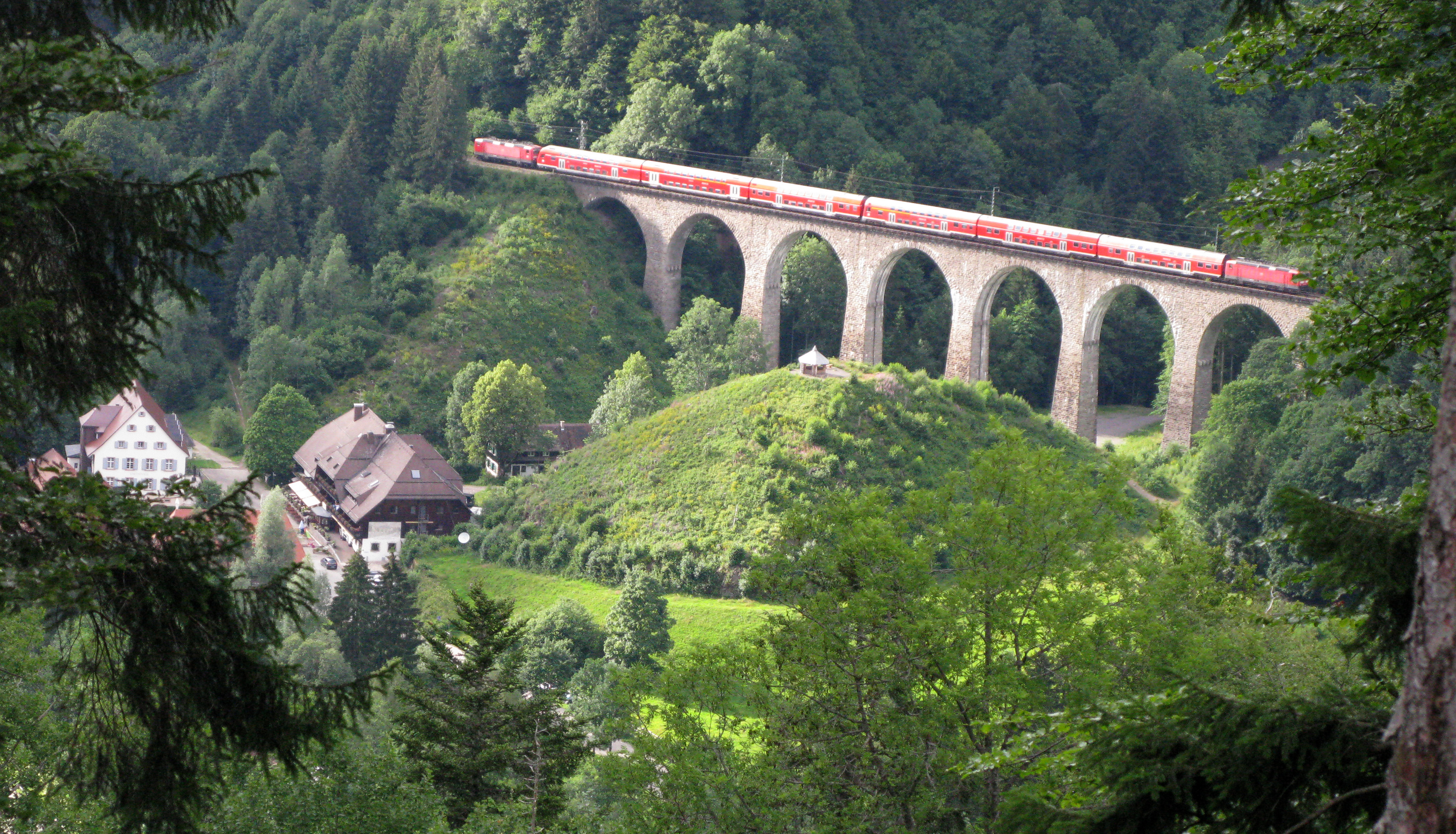 Ravennabrücke mit Hofgut Sternen und Galgenbühl